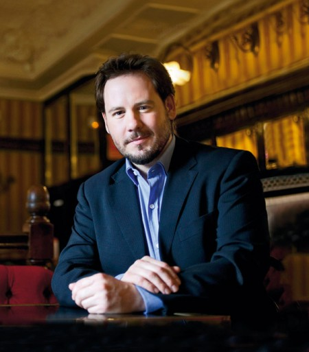 Tenor Israel Lozano